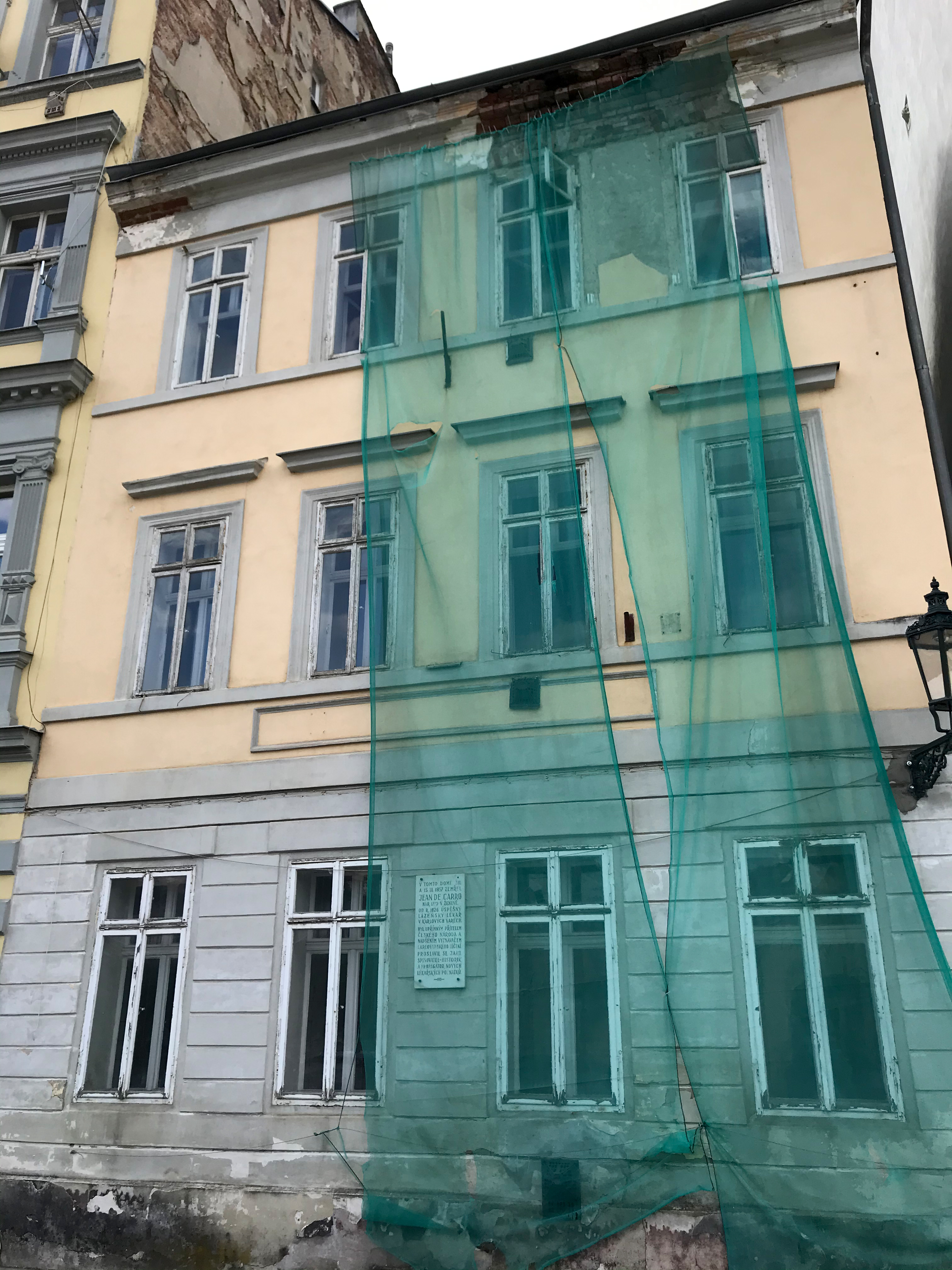 Dům, ve kterém žil a zemřel lékař Jean de Carro – Karlovy Vary, Pod Jelením skokem 399/18